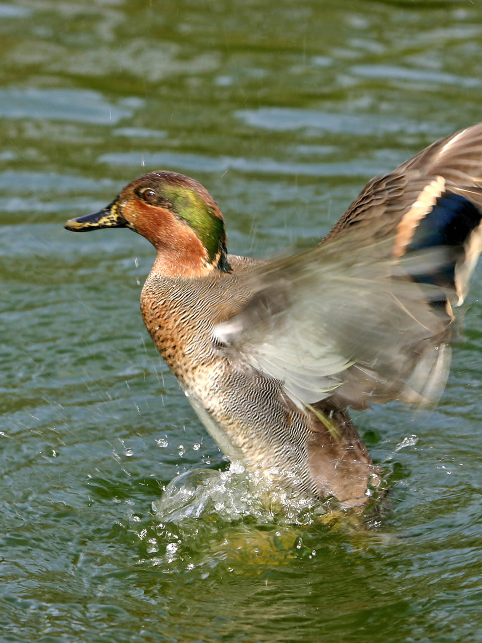 Sarcelle d'hiver (Anas crecca). La sarcelle est un canard de surface.